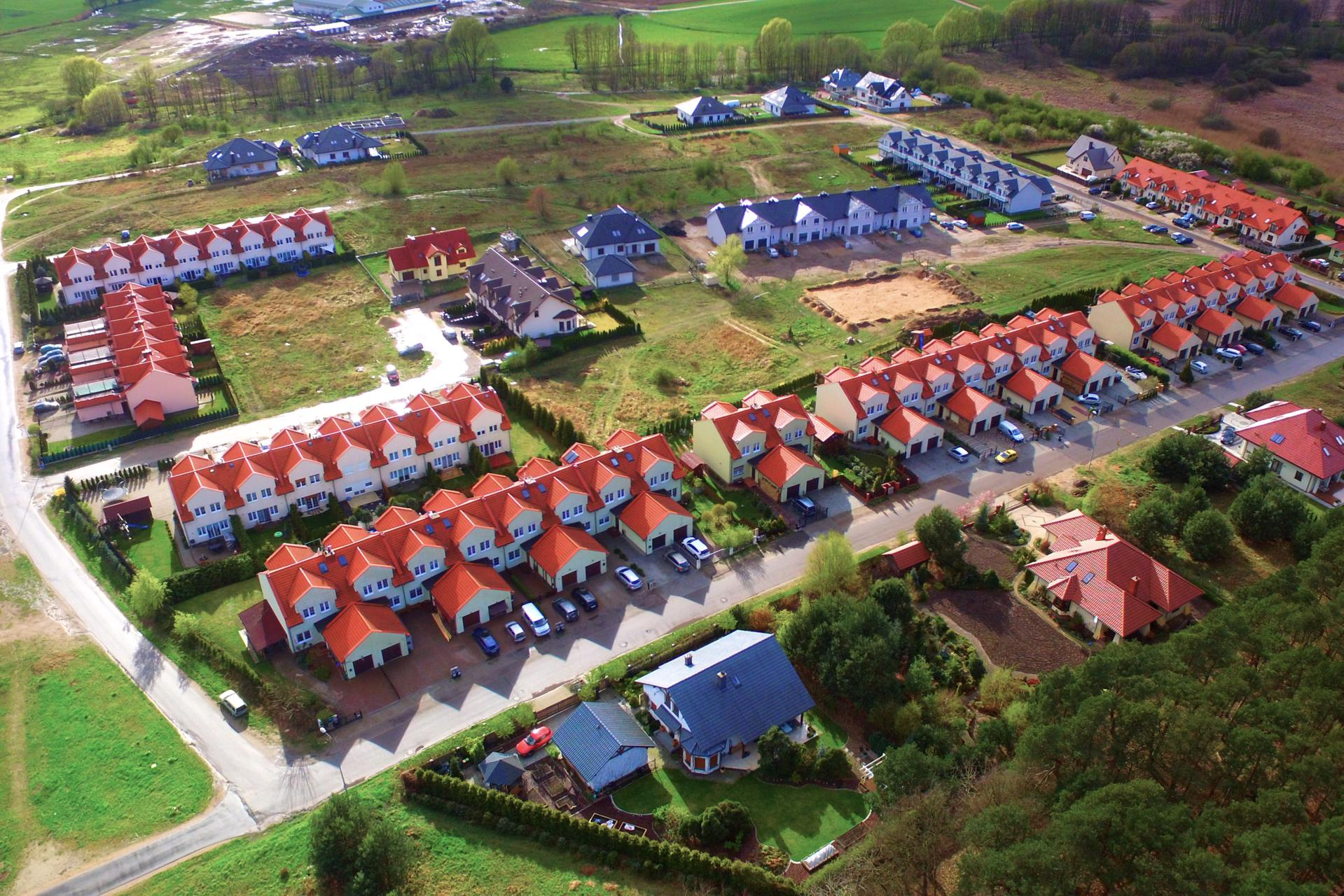 Zabudowa szeregowa w Kłodawie